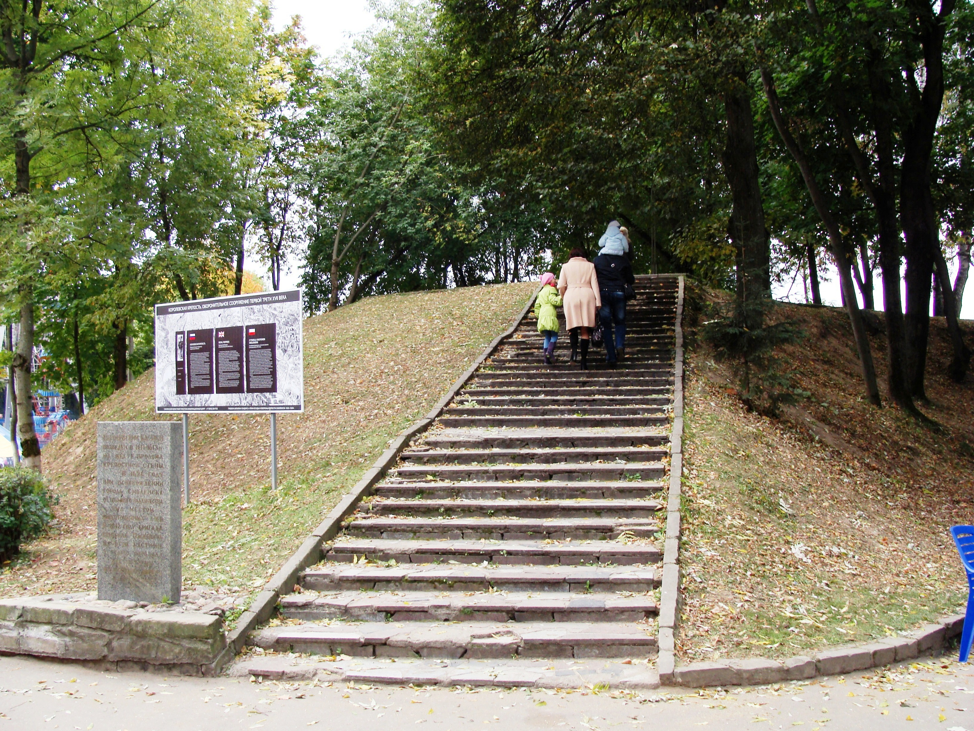 Королевский бастион - оборонительное сооружение в Лопатинском саду в Смоленске